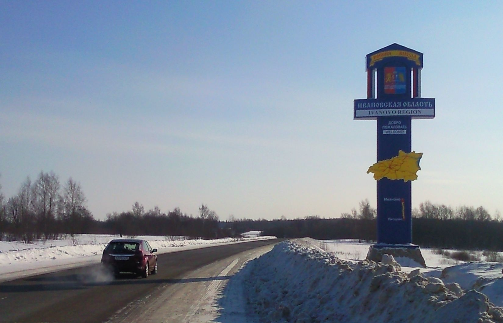 Въезд в Ивановскую область со стороны Ярославской в районе села Осенево